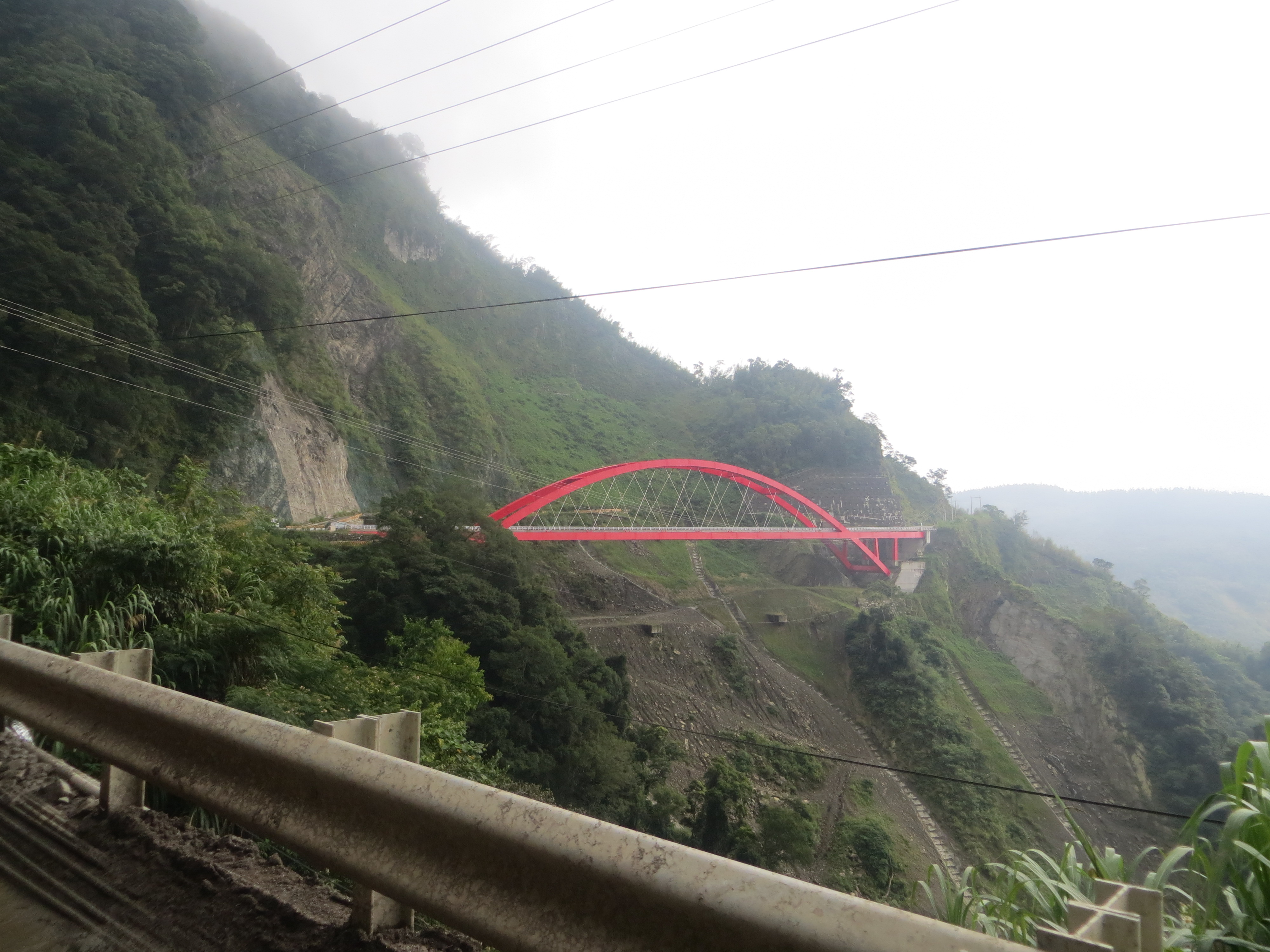 於八八風災崩塌的台18線71公里處，已由紅色鋼拱橋替代，以鄒族語之山芙蓉命名為芙谷峩橋。